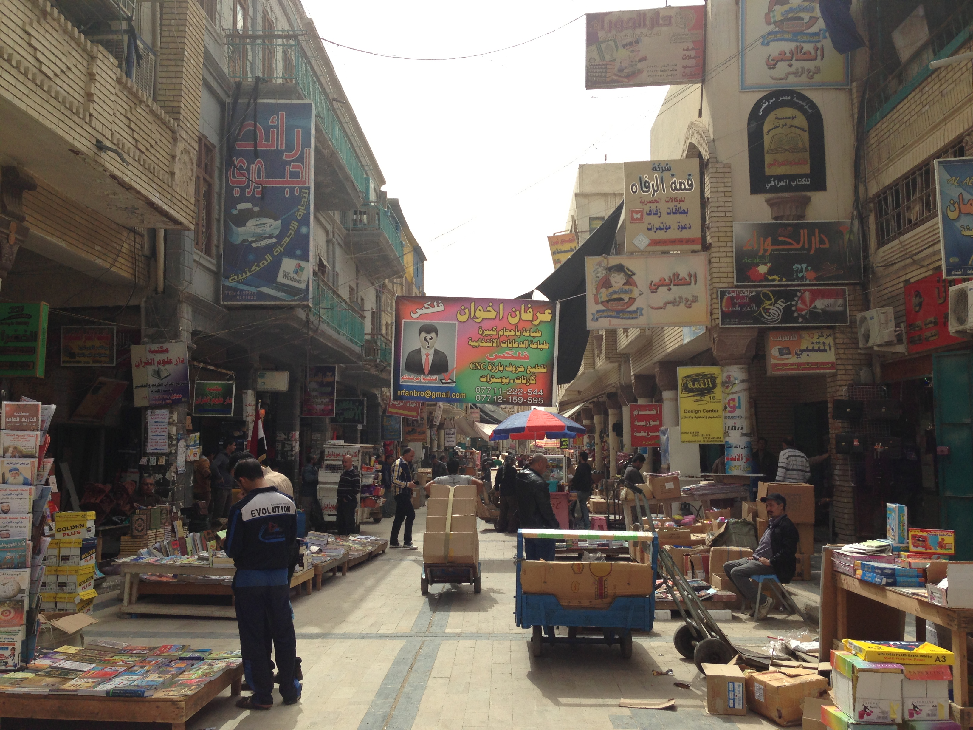 شارع المتنبي Baghdad, 2013